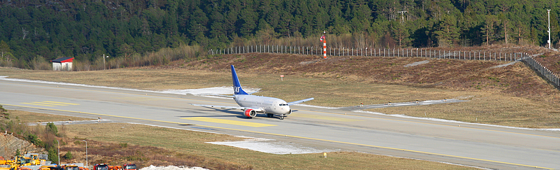 SAS på RW25 KSU